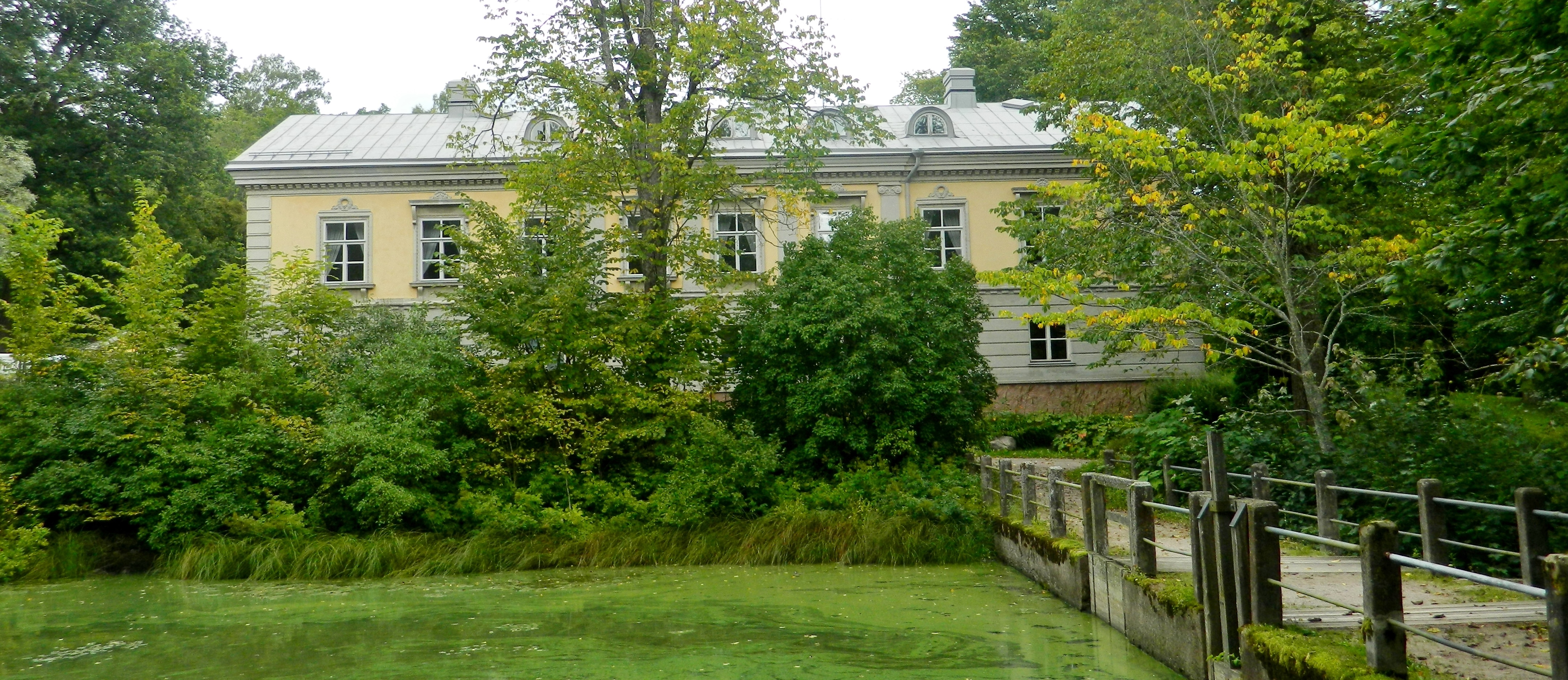 Espoon kartano